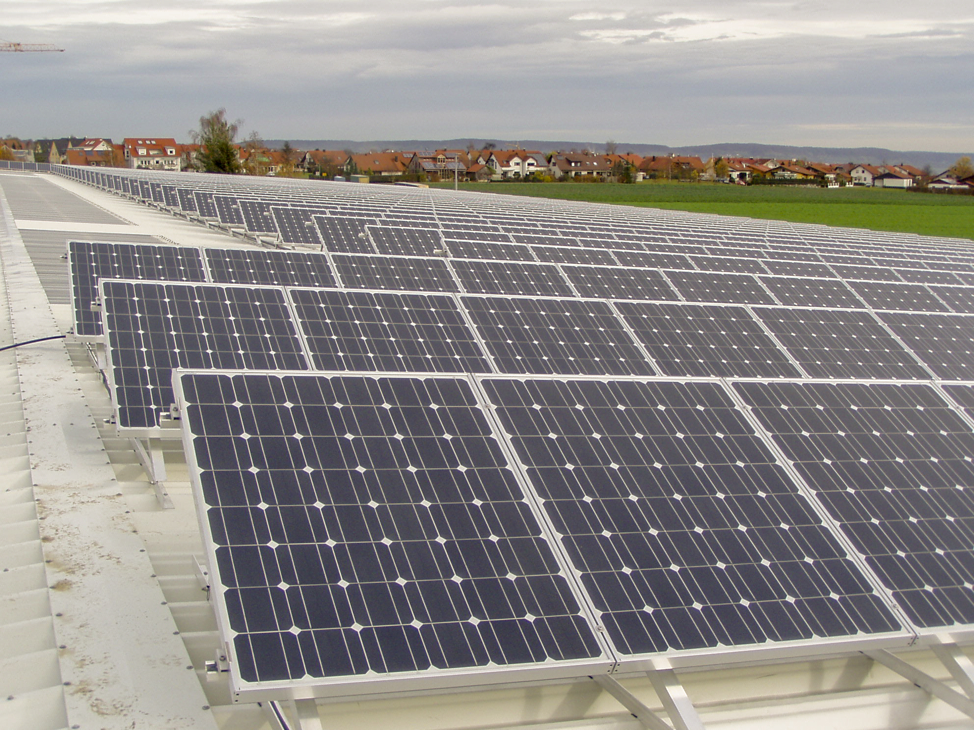 Radrennbahn Öschelbronn, Photovoltaikanlage auf dem Dach